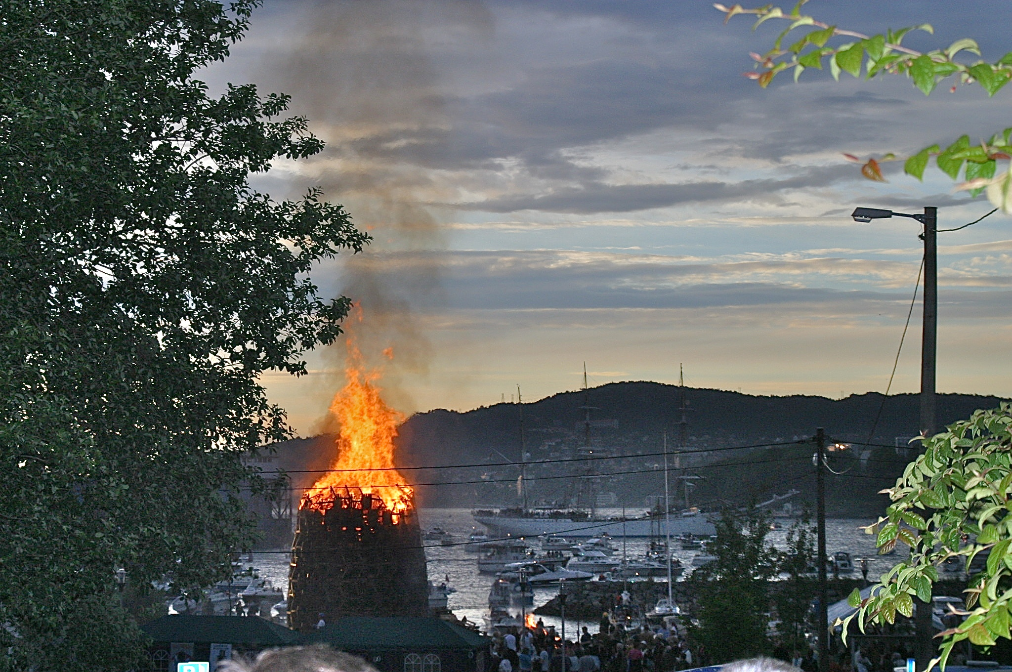 Tønnebål på Laksevåg